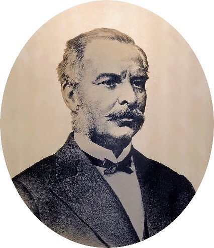 Rudolf Ott, starosta Brna v letech 1855-1861 a 1868–1870